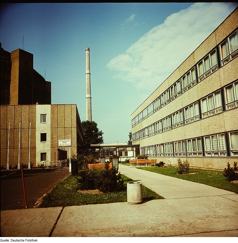 Original image description from the Deutsche Fotothek Schule